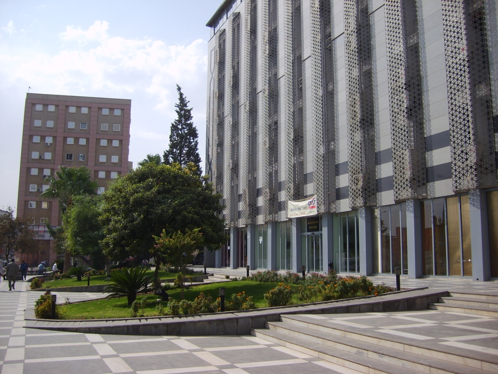 Şanlıurfa Belediyesi..